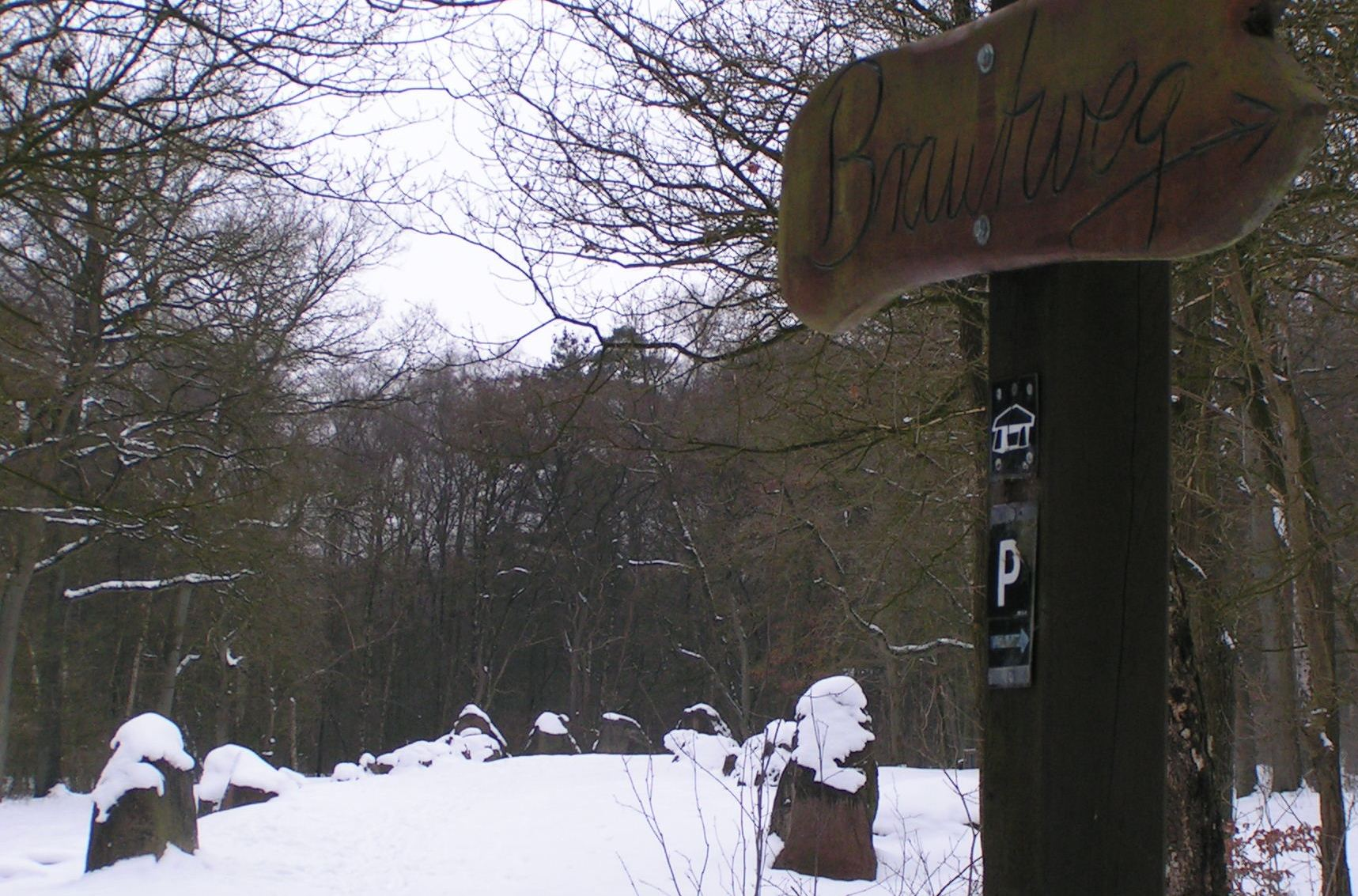 Pickerweg und Geestweg bei der Visbeker Braut (Großsteingrab) bei Wildeshausen